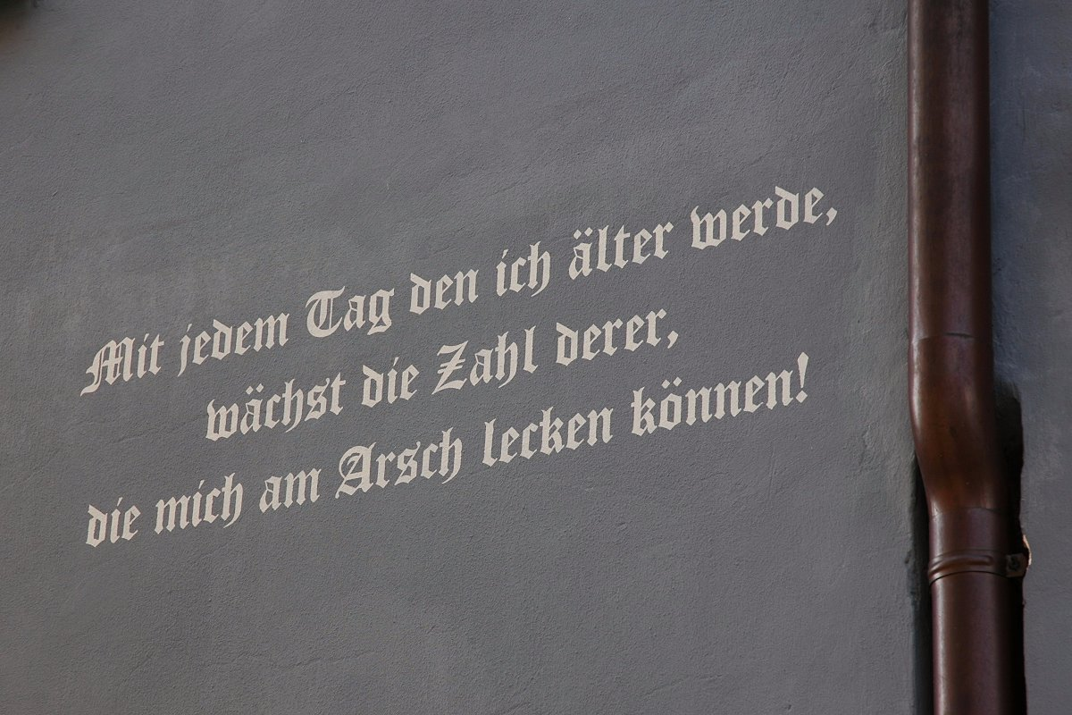 Götz-Zitat bzw. Schwäbischer Gruß an einer Hauswand in der Ludwigsstraße des Ortsteils Partenkirchen / Marktgemeinde Garmisch-Partenkirchen.